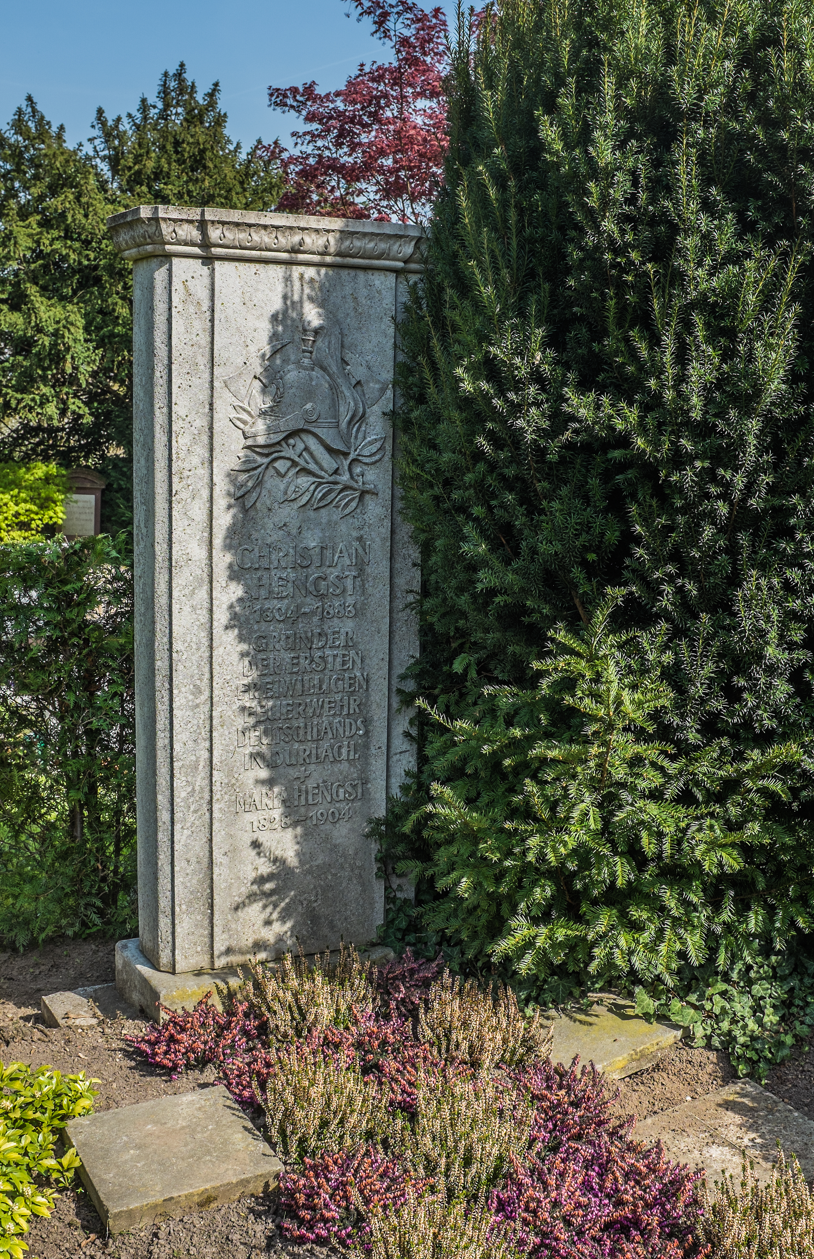 Bergfriedhof Durlach - Historisches Grabmal von Christian Hengst, des Gründers einer der ersten Freiwilligen Feuerwehren Deutschlands.